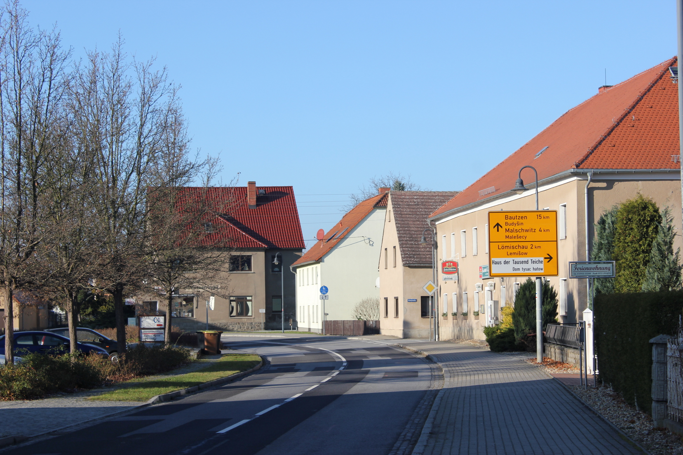 Hornjoserbsce: Hłowna dróha w Hućinje.